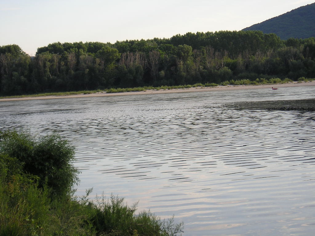 Morava-Danube meeting